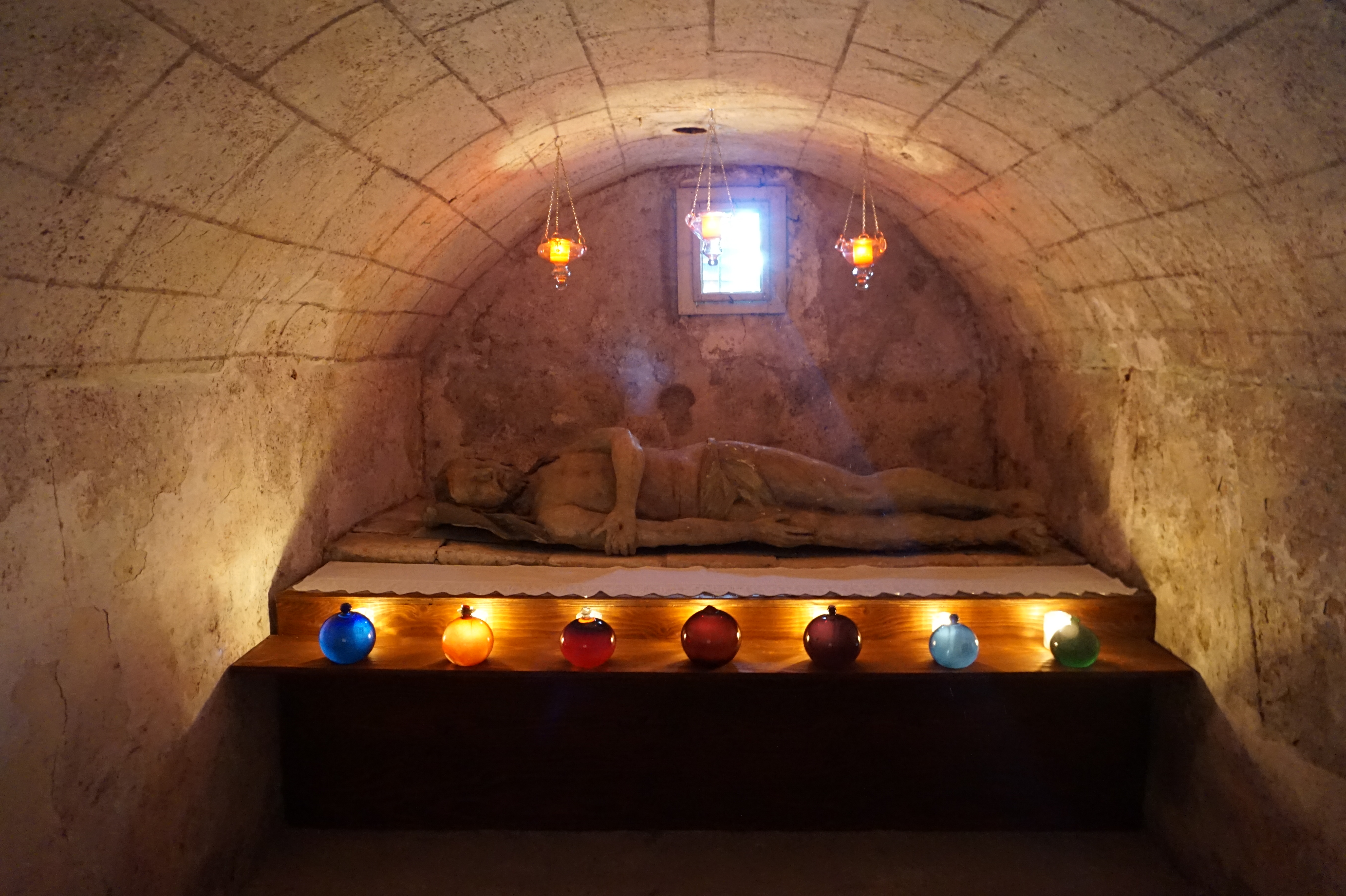 Evang. Filialkirche, Kalvarienbergkirche